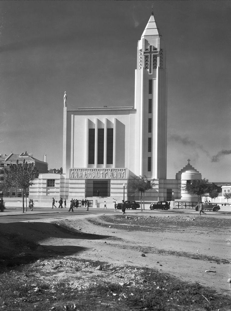 Igreja de Nossa Senhora de Fátima de Lisboa. Fachada principal em finais de 1938. Autor do projeto: Arquiteto Porfírio Pardal Monteiro (1897-1957) e outros, 1934 a 1938. Fotografia sem data produzida durante a atividade do Estúdio Mário Novais: 1933-1983. Fotografias dos arquivos da Fundação Calouste Gulbenkian CFT003 100752.ic, Lisboa, Portugal.